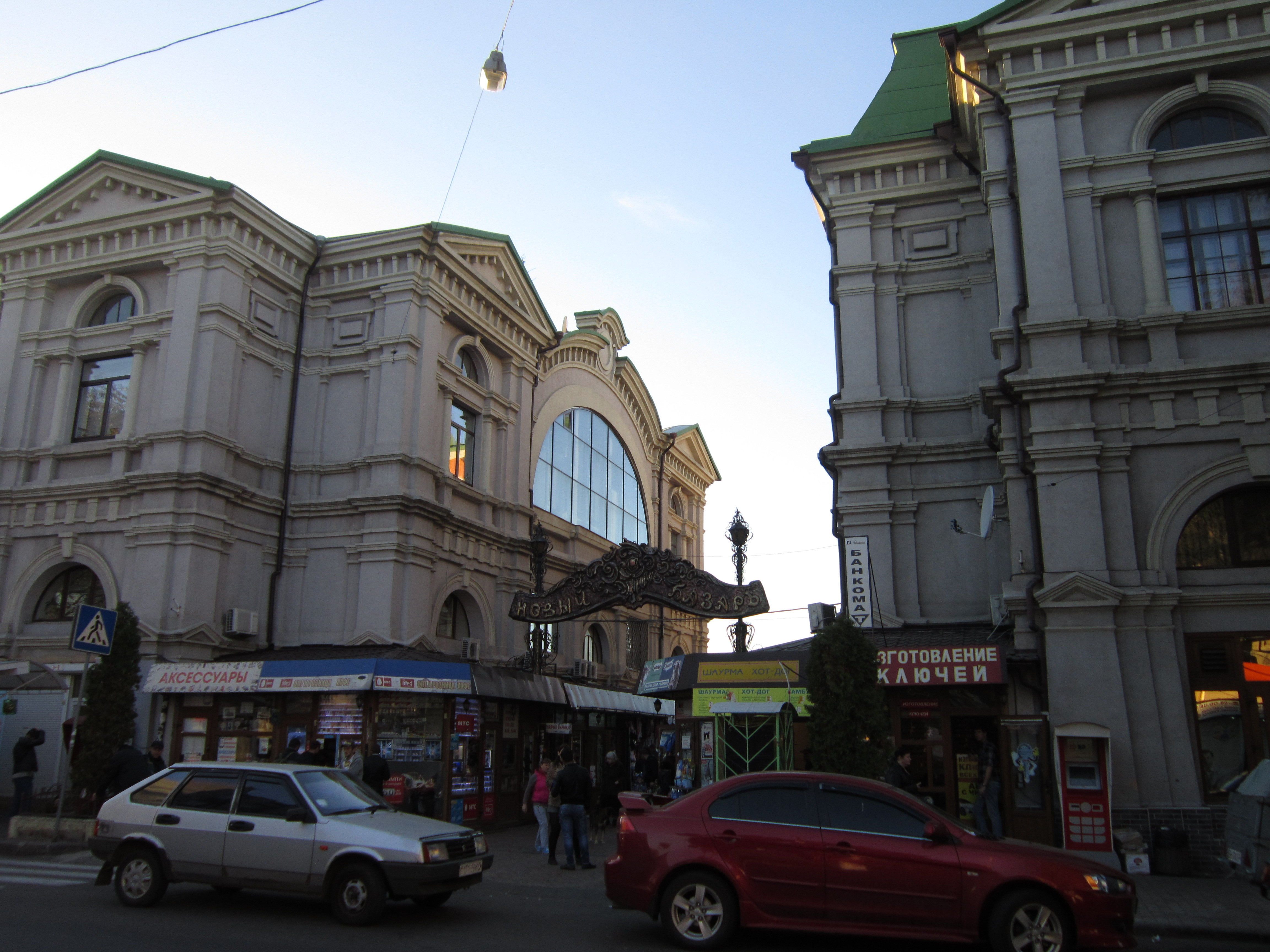 Торговий ряд, Одеса, Торгова вул., 28